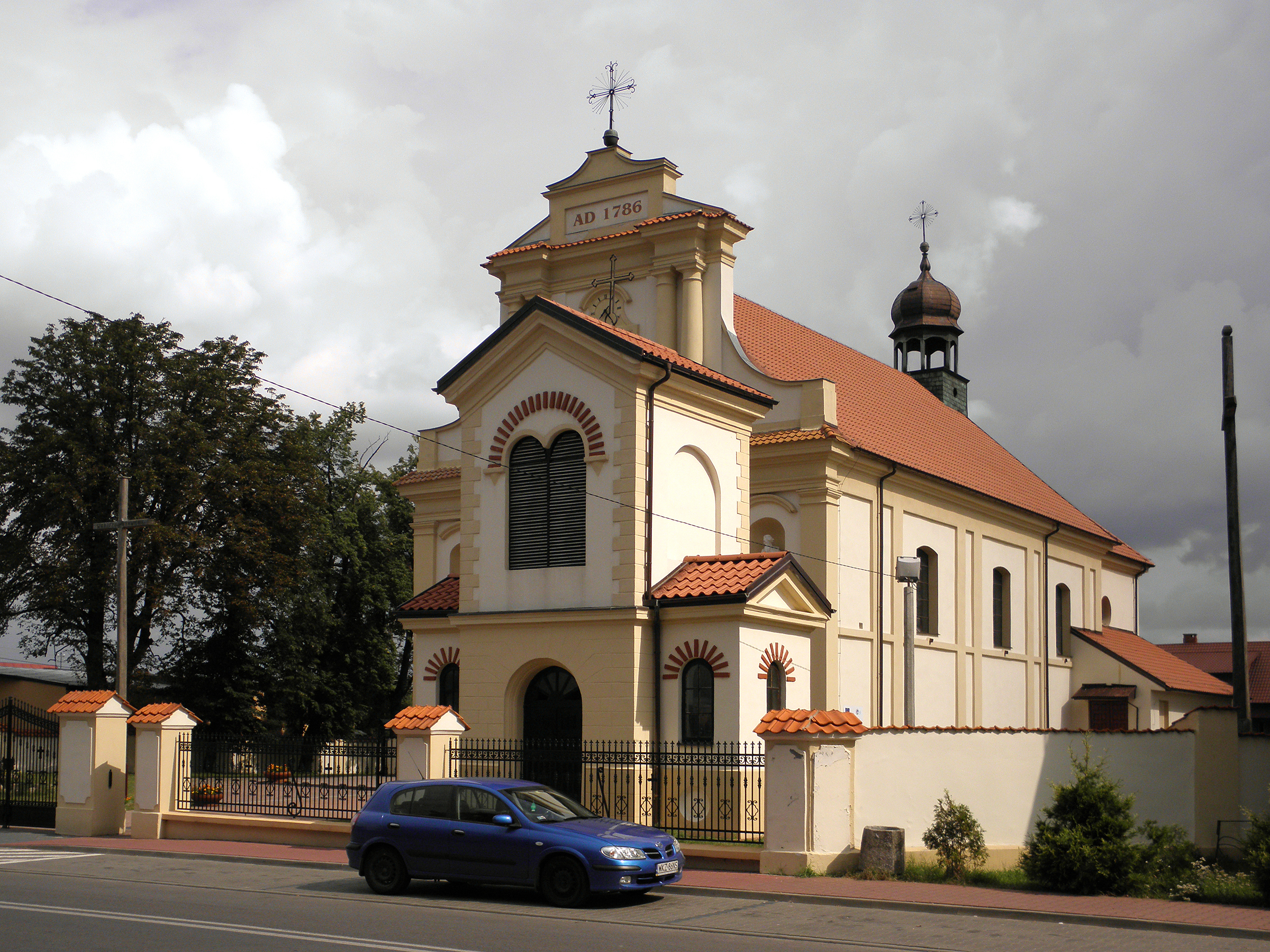 Magnuszew - kościół św.Katarzyny.